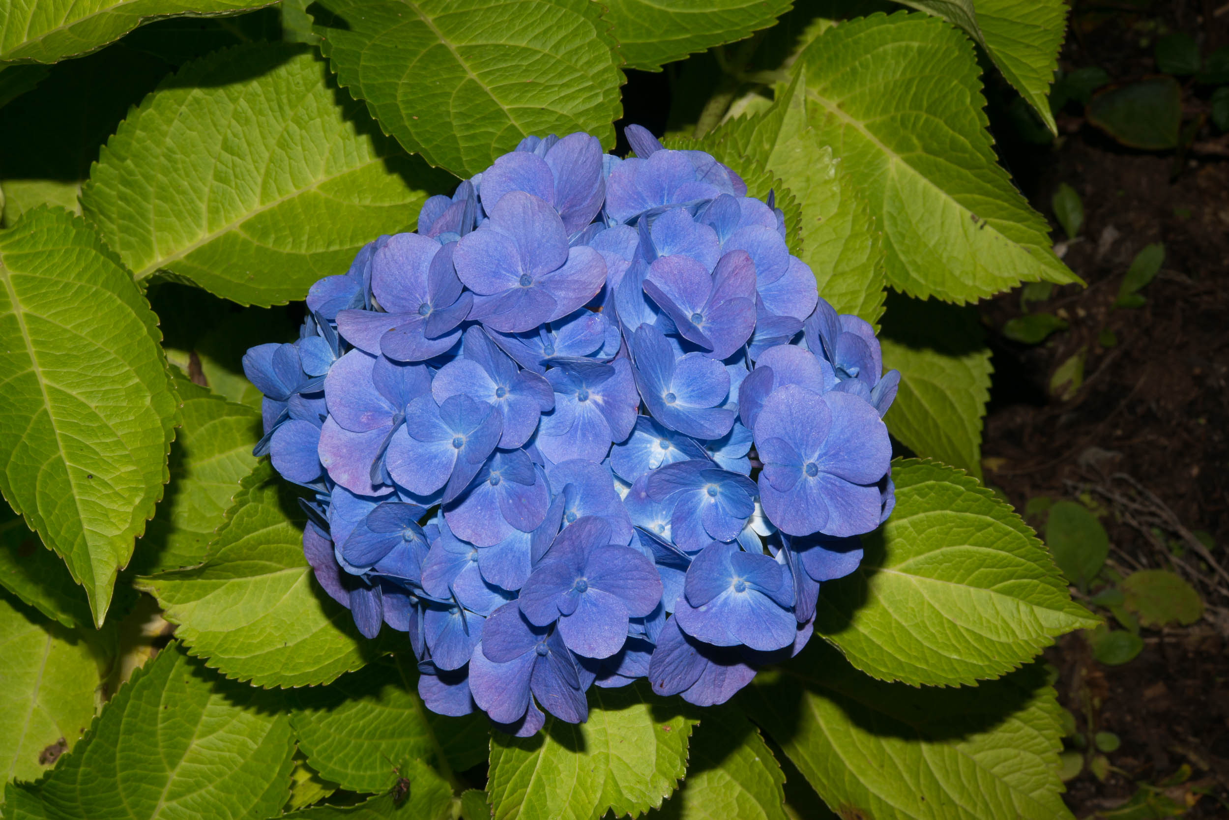 blava